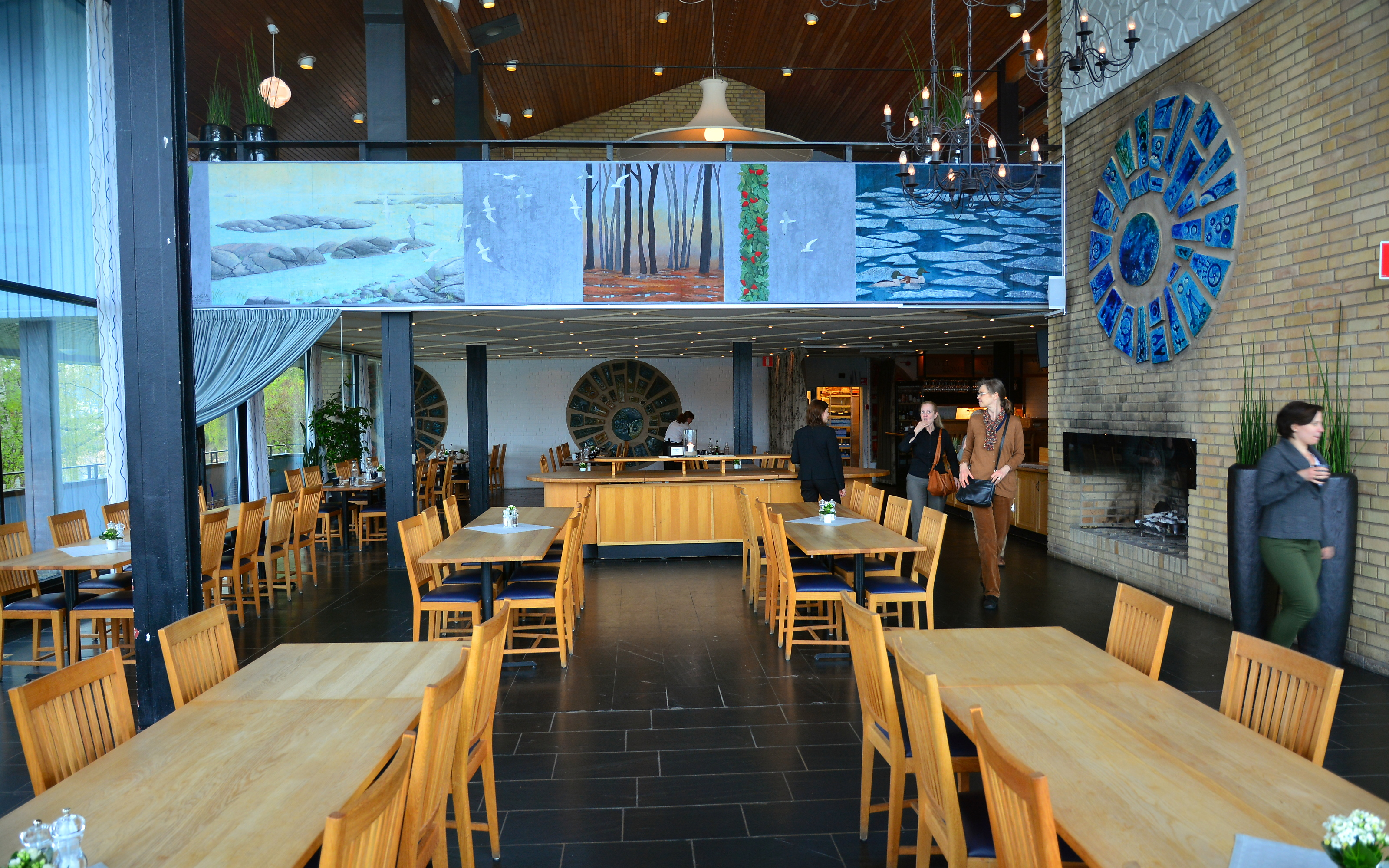 Matsalen på Skåvsjöholm i Österåker